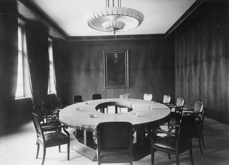 Berlin, die Reichskanzlei UBz: Kabinettssitzungssaal in der neuen Reichskanzlei.